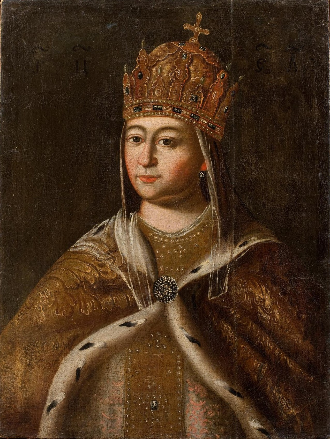 Evdokia Streshneva Неизвестный художник Портрет Е.Л. Стрешневой Кон. XVII - нач. XVIII в. Х., м. 76,0x58,0 ГИМ 65694 ИЗО ИI-281